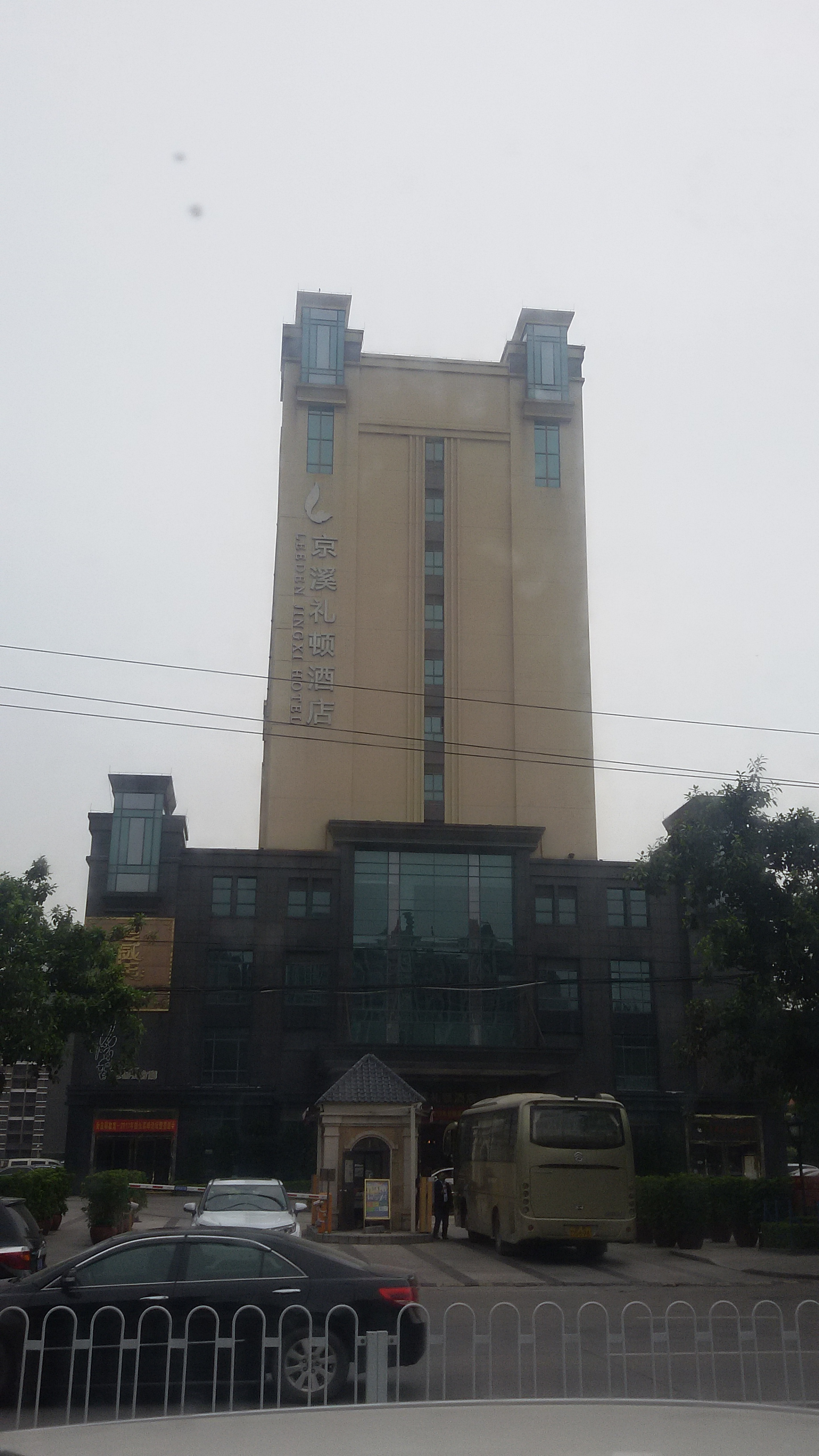 粵語: 京溪禮頓酒店